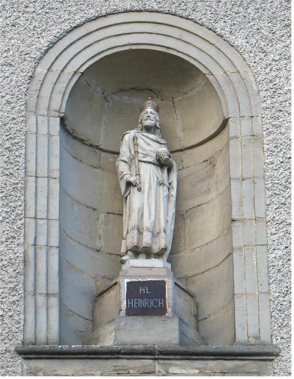 Kopleschter Kierch (Abrëll 2006)